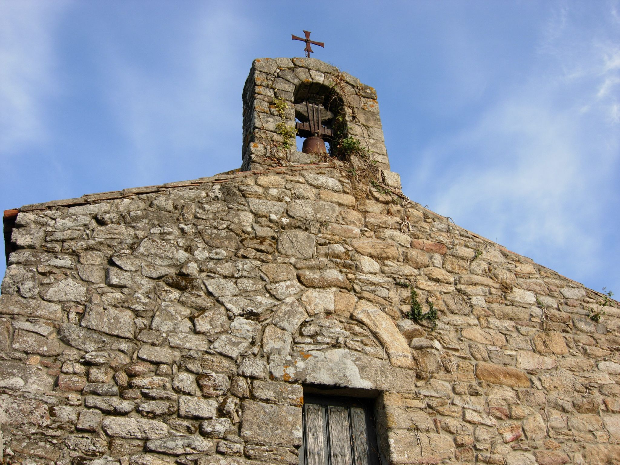 Fachada occidental de la capilla.